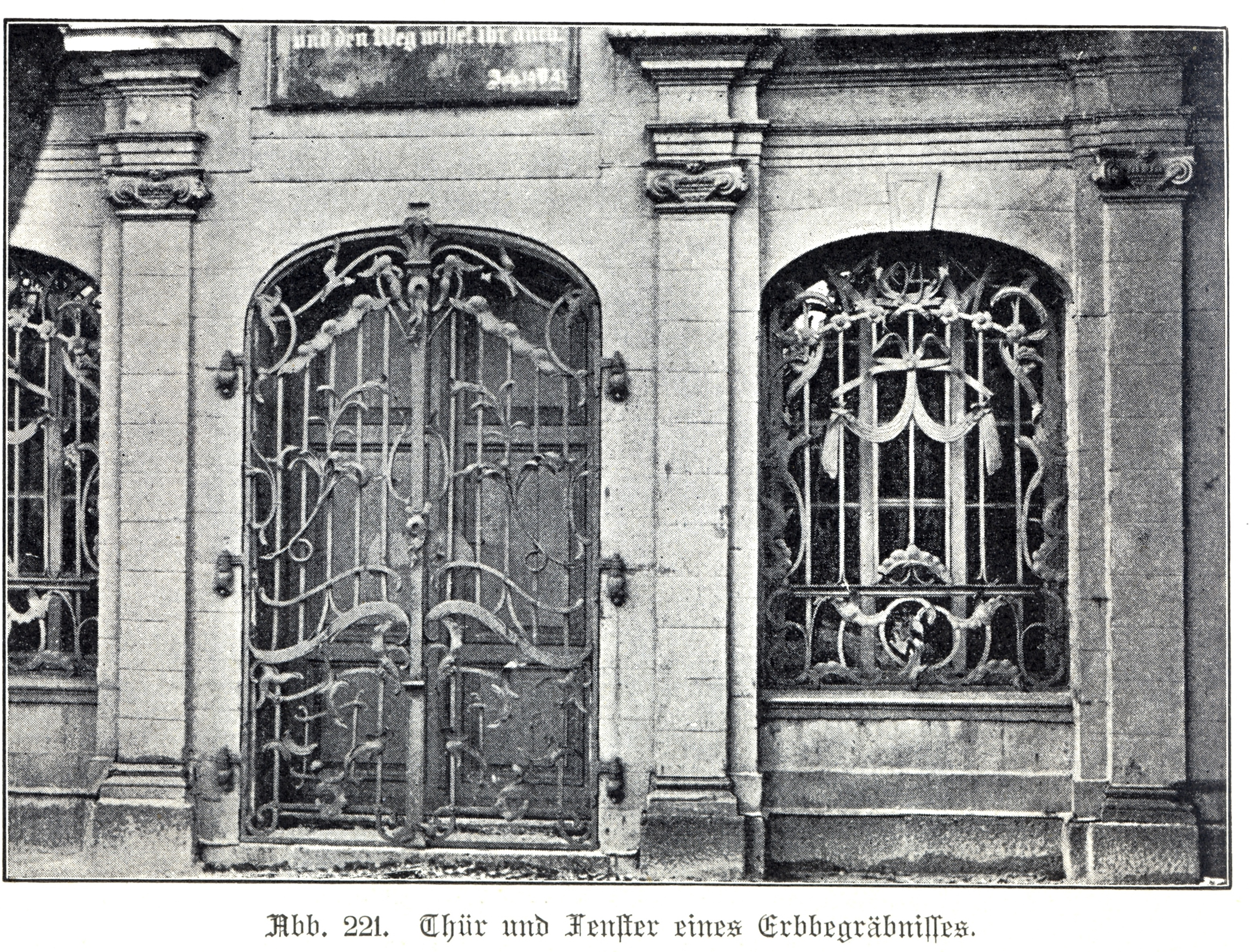 Königsberg, Tür und Fenster eines Erbbegräbnis